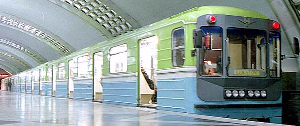 Электропоезд метрополитена 81-718.0-719.0 на станции Чкалов, Ташкент